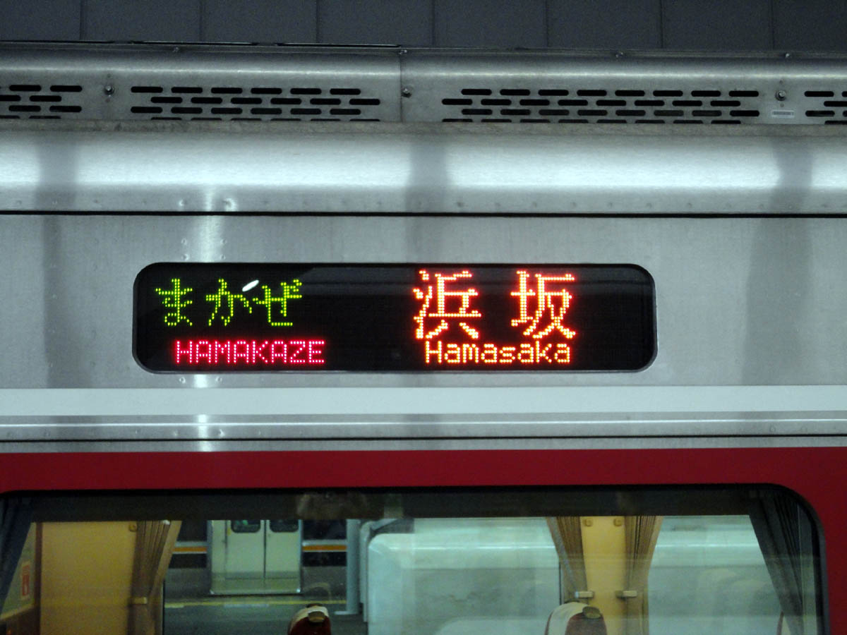 JR西日本 キハ189系（行き先表示器）